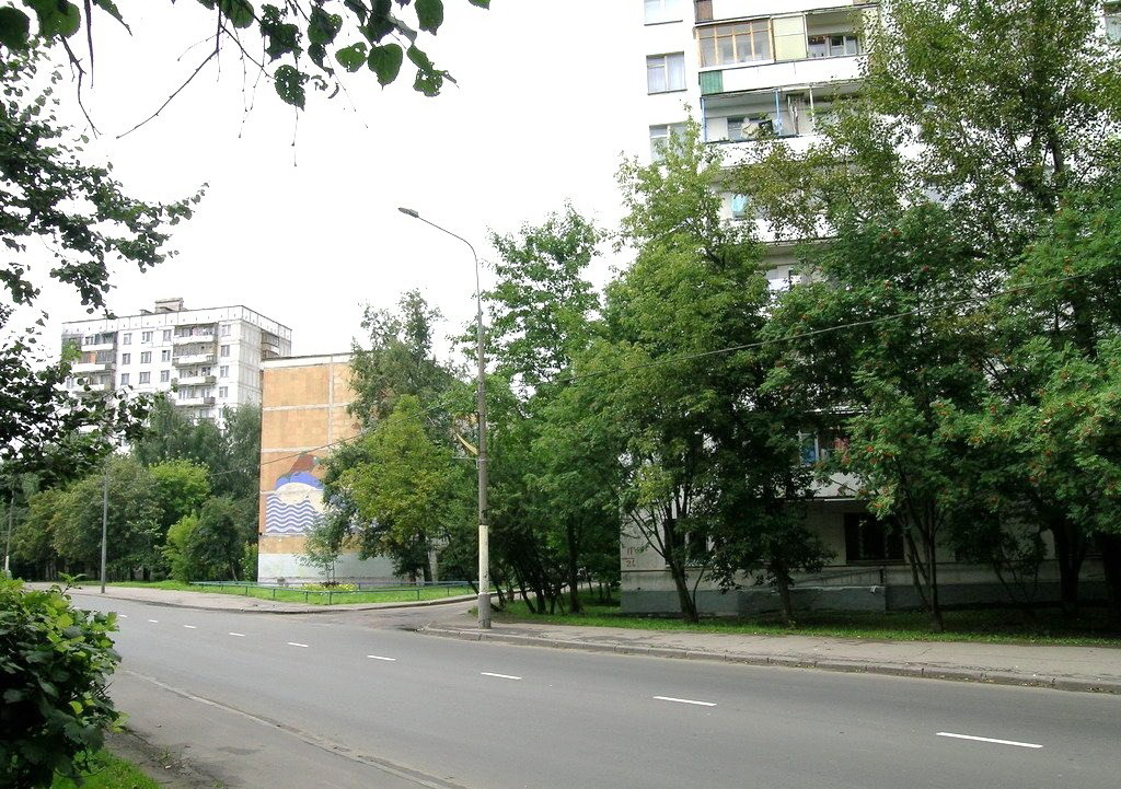 Ангарская улица до реконструкции.